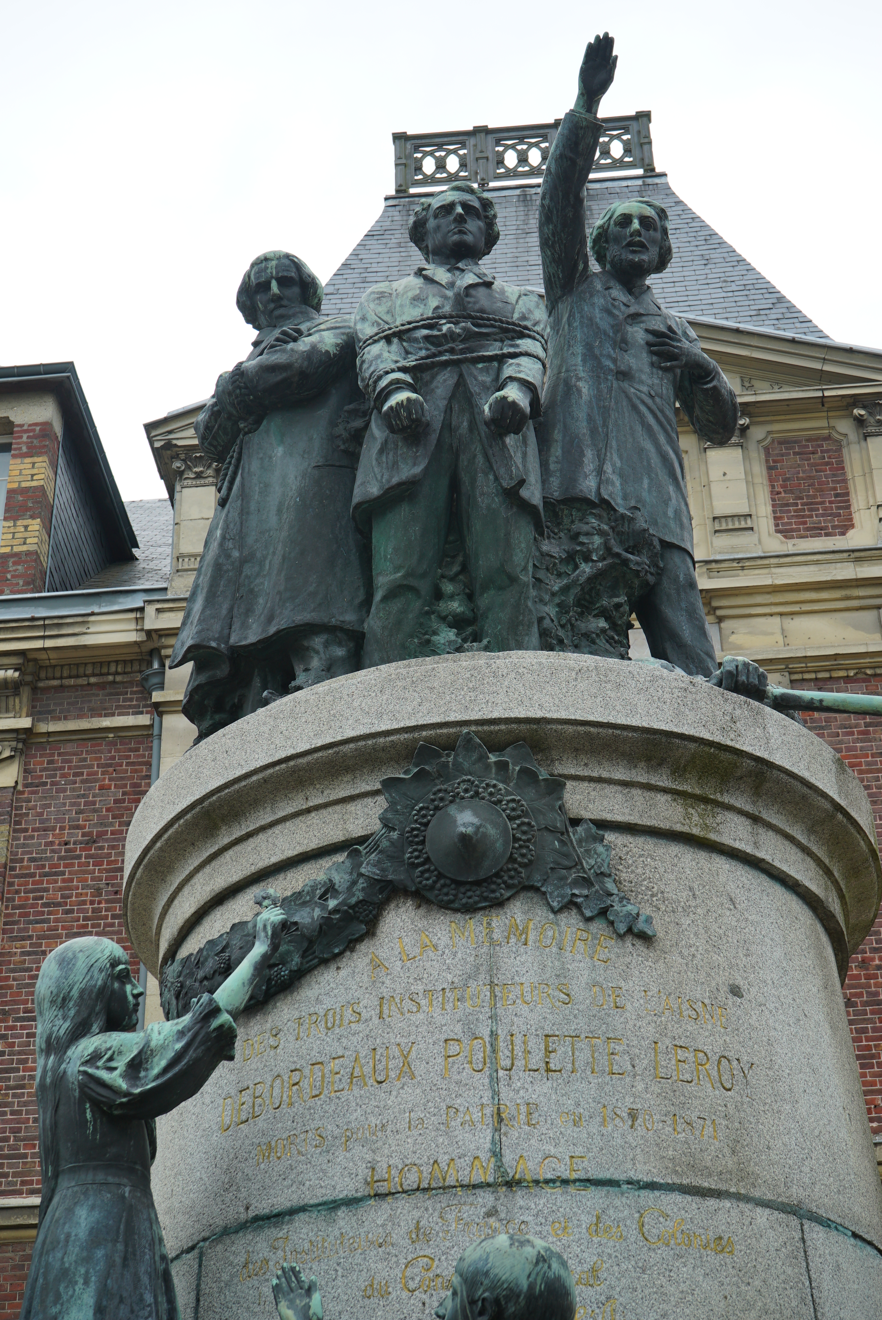 à Laon.